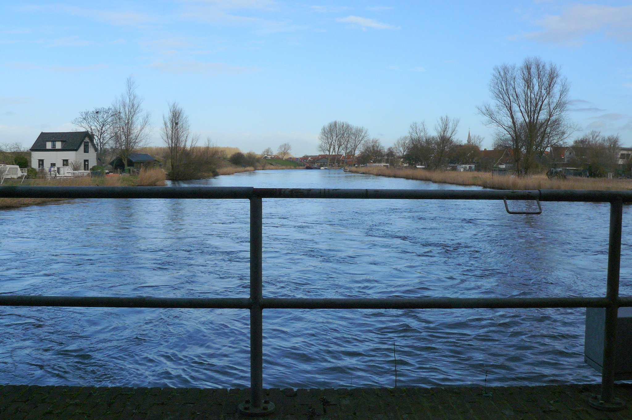 Zicht vanaf het gemaal op het boezemkanaal naar het noorden. Aan het einde buigt het boezemkanaal naar rechts en gaat door de sluis onder de IJdijk. Het water bereikt via Zijkanaal C het Noordzeekanaal.